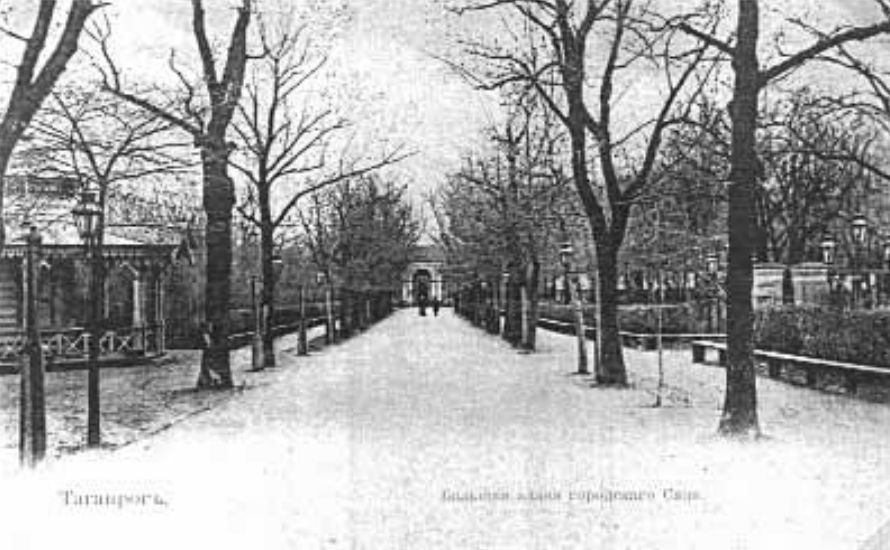 Центральная аллея городского сада , Таганрог Ростовская область РФ